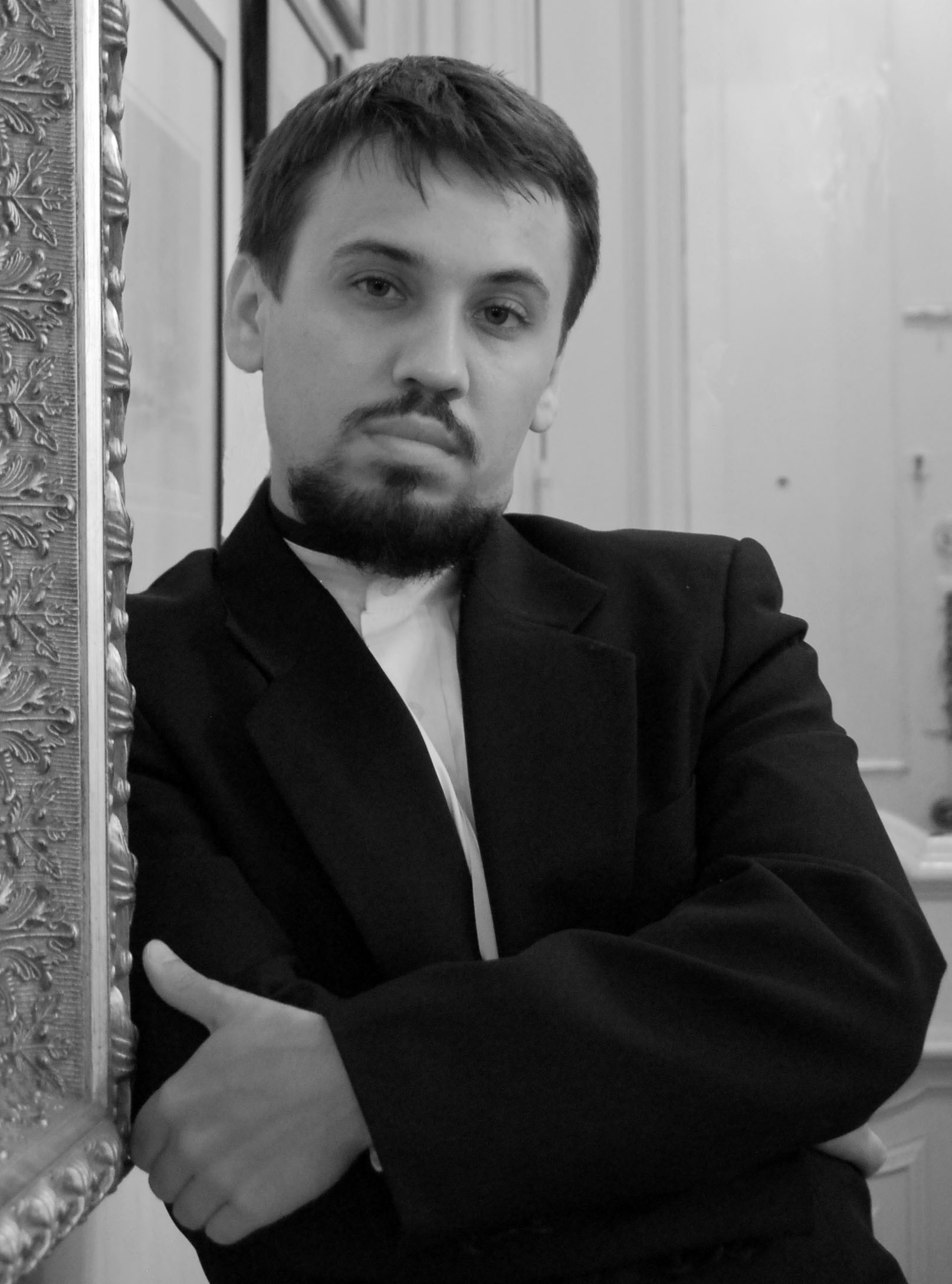 Daniel Khalikov, usbekish violinist